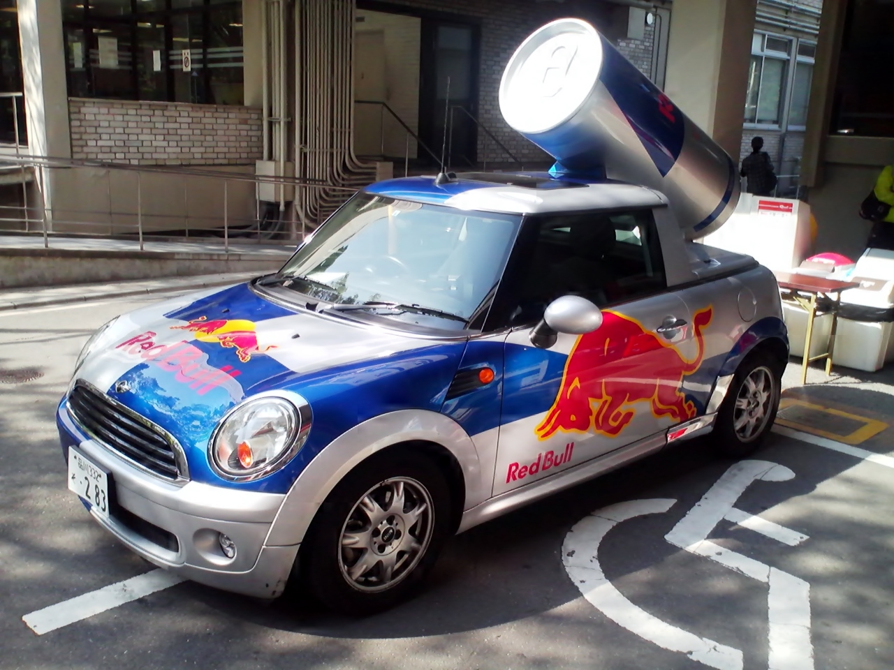 レッドブルミニ（R55型ベース）をフロントから撮影。